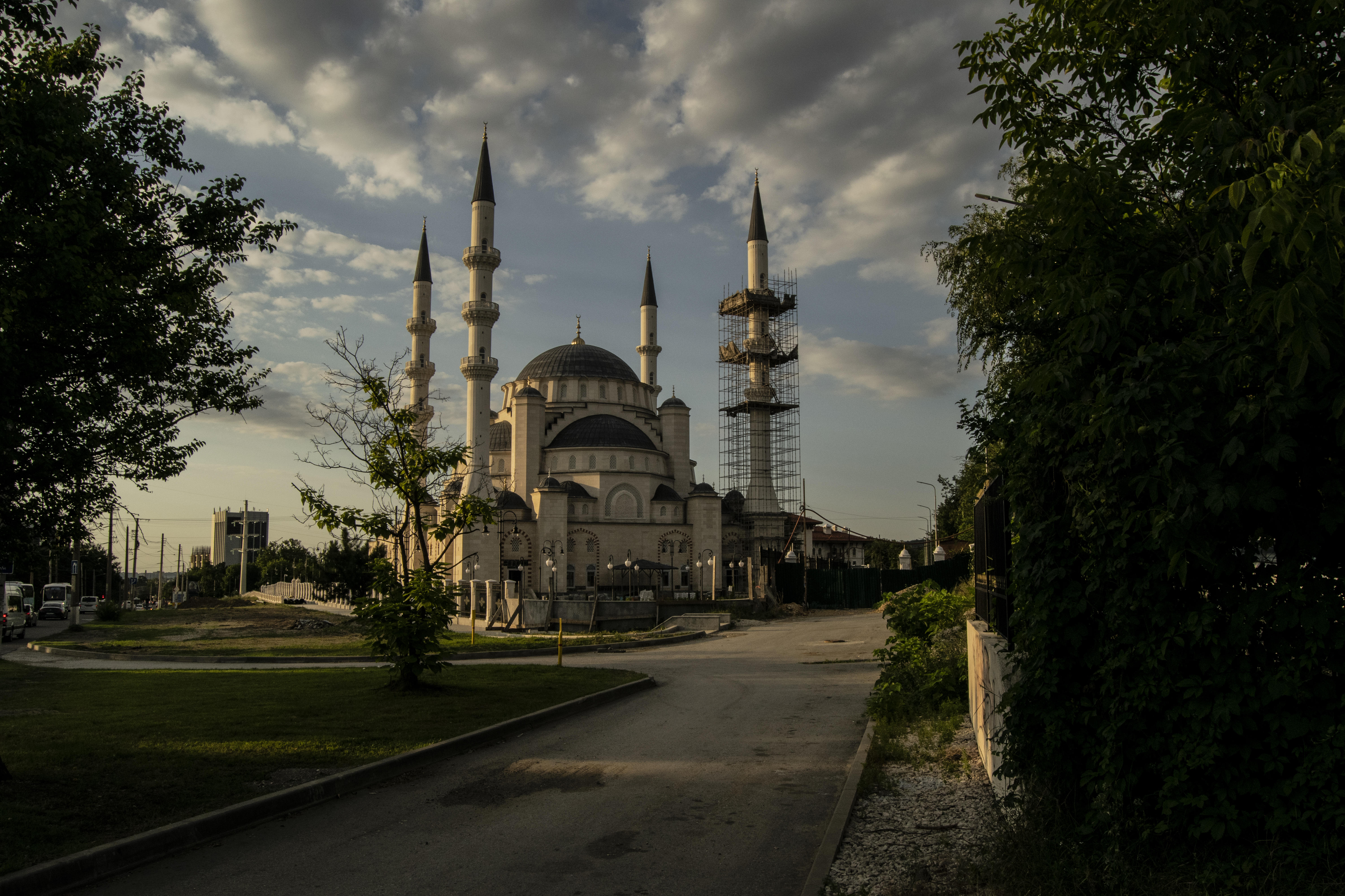 Симферопольская соборная мечеть (Акъмесджит Джума Джами)